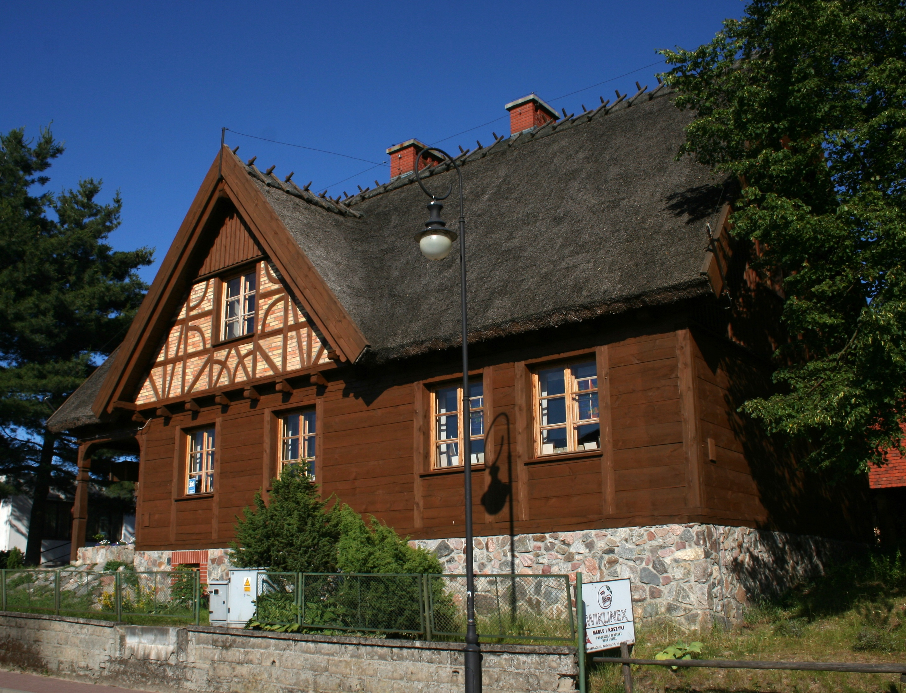 Kaszubski Dom Rękodzieła Ludowego w Swornegaciach